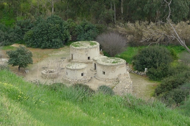 Modelrekonstruktion jungsteinzeitlicher Häuser der Siedlung bei Chirokitia, Zypern.